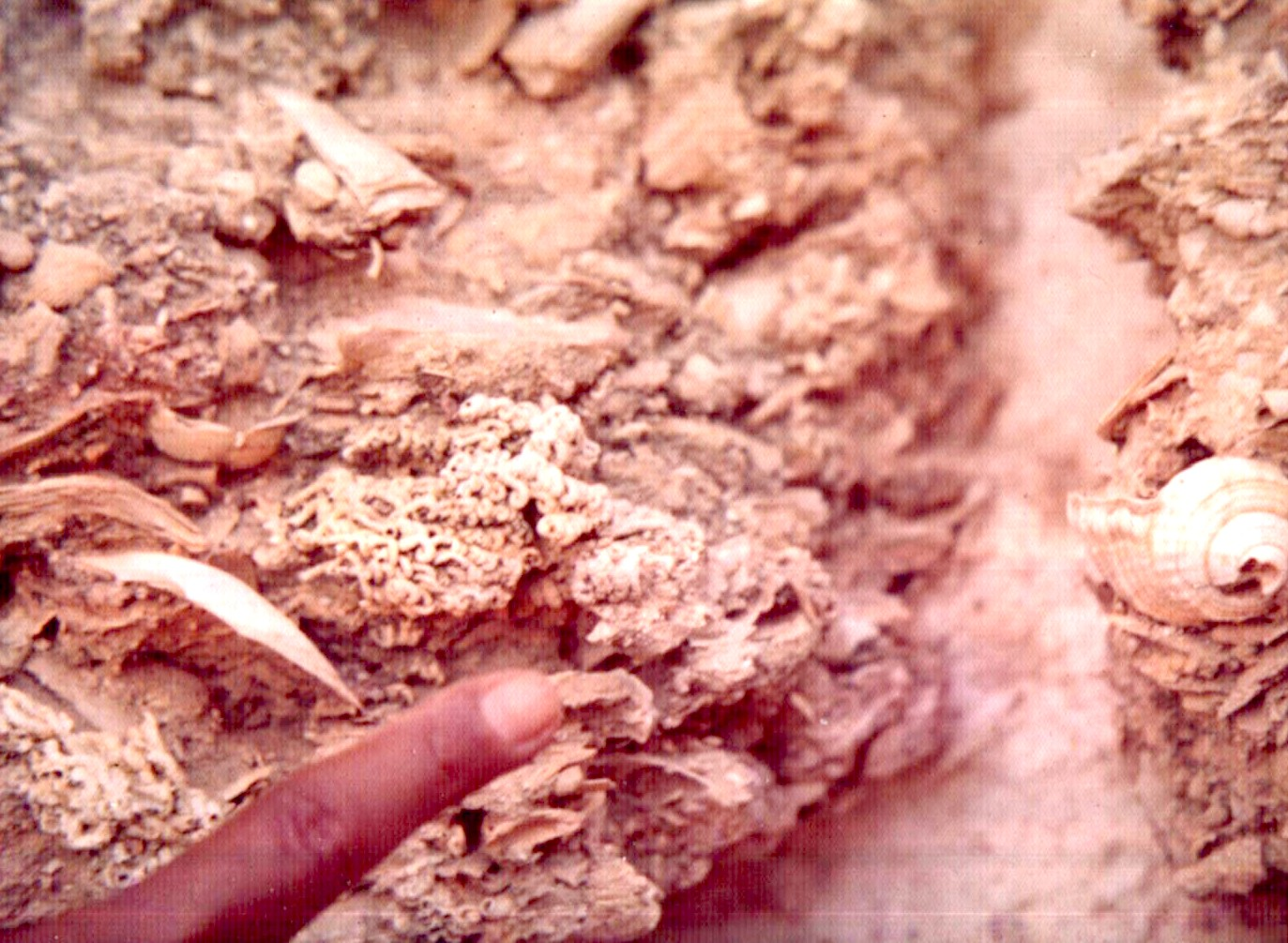 Fosiles de region del castillo de Araya - Venezuela Municipio Cruz Salmerón Acosta. Estado Sucre Venezuela